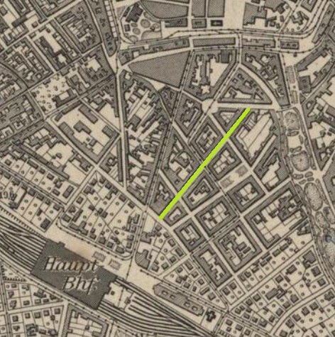 Die Christianstraße in Dresden (markiert), 1904